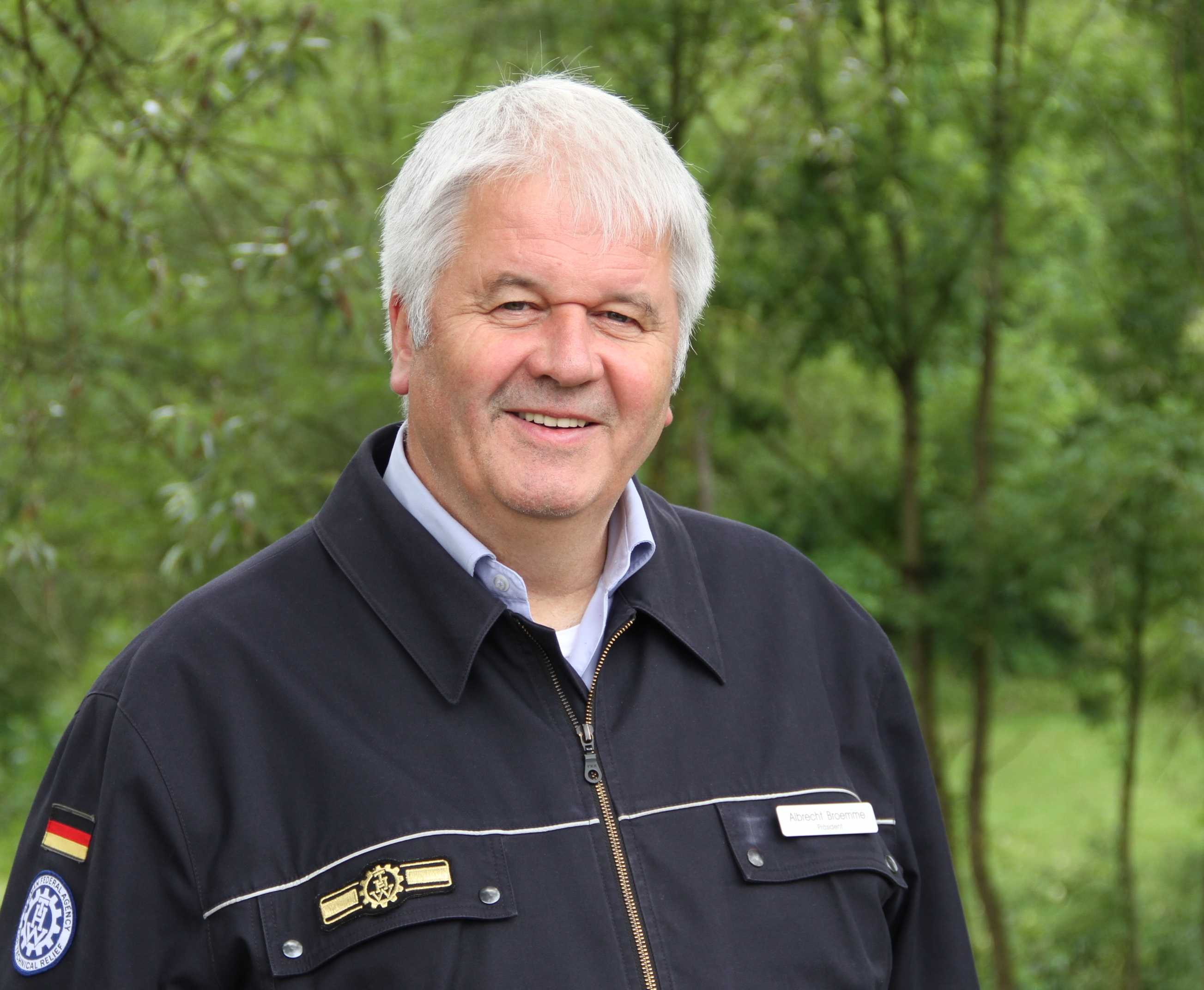 Albrecht Broemme, Präsident der Bundesanstalt Technisches Hilfswerk, im Juni 2017.